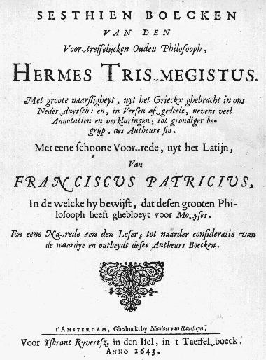 Corpus Hermeticum, niederländische Ausgabe von 1643. Deckblatt Corpus Hermeticum 1643 (Ausg. F. Patricius).